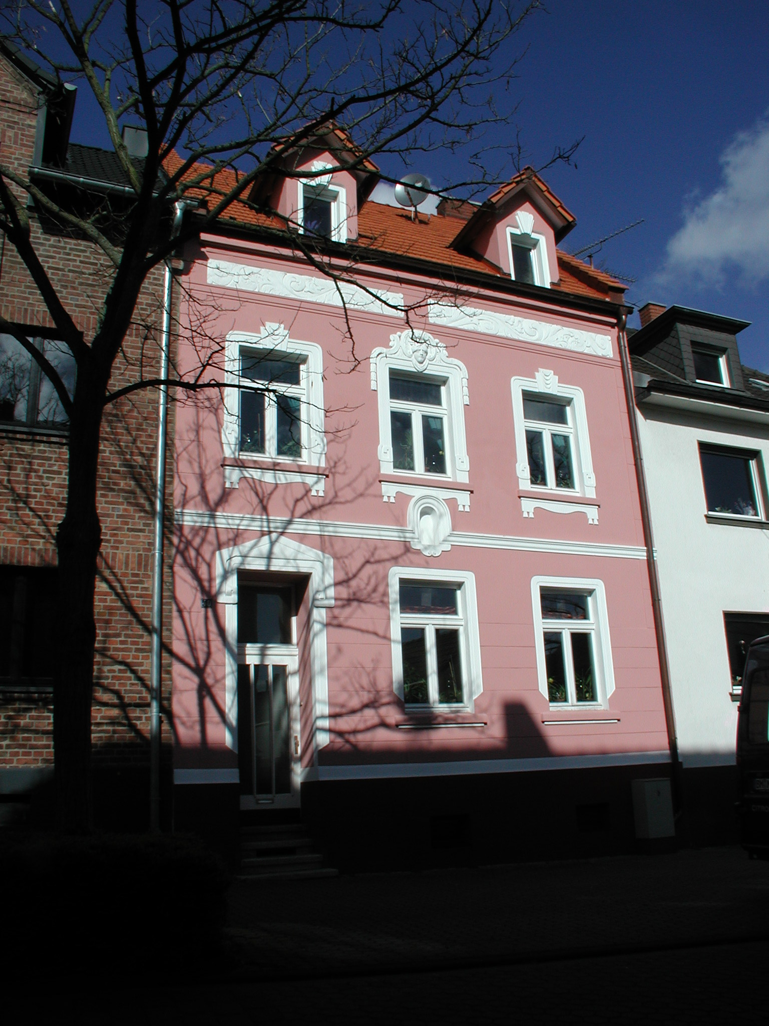 Alt-Hürth, Jugendstilhaus in der Breiten Straße